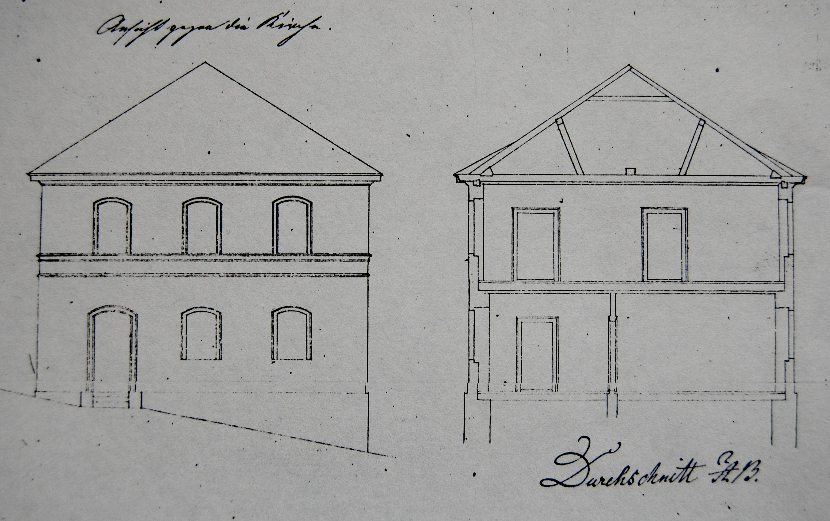 "Plan über ein neu zu errichtendes Schulhaus in Gleiritsch" Die Bauausführung erfolgte 1840, im Jahre 1974 wurde es abgerissen.